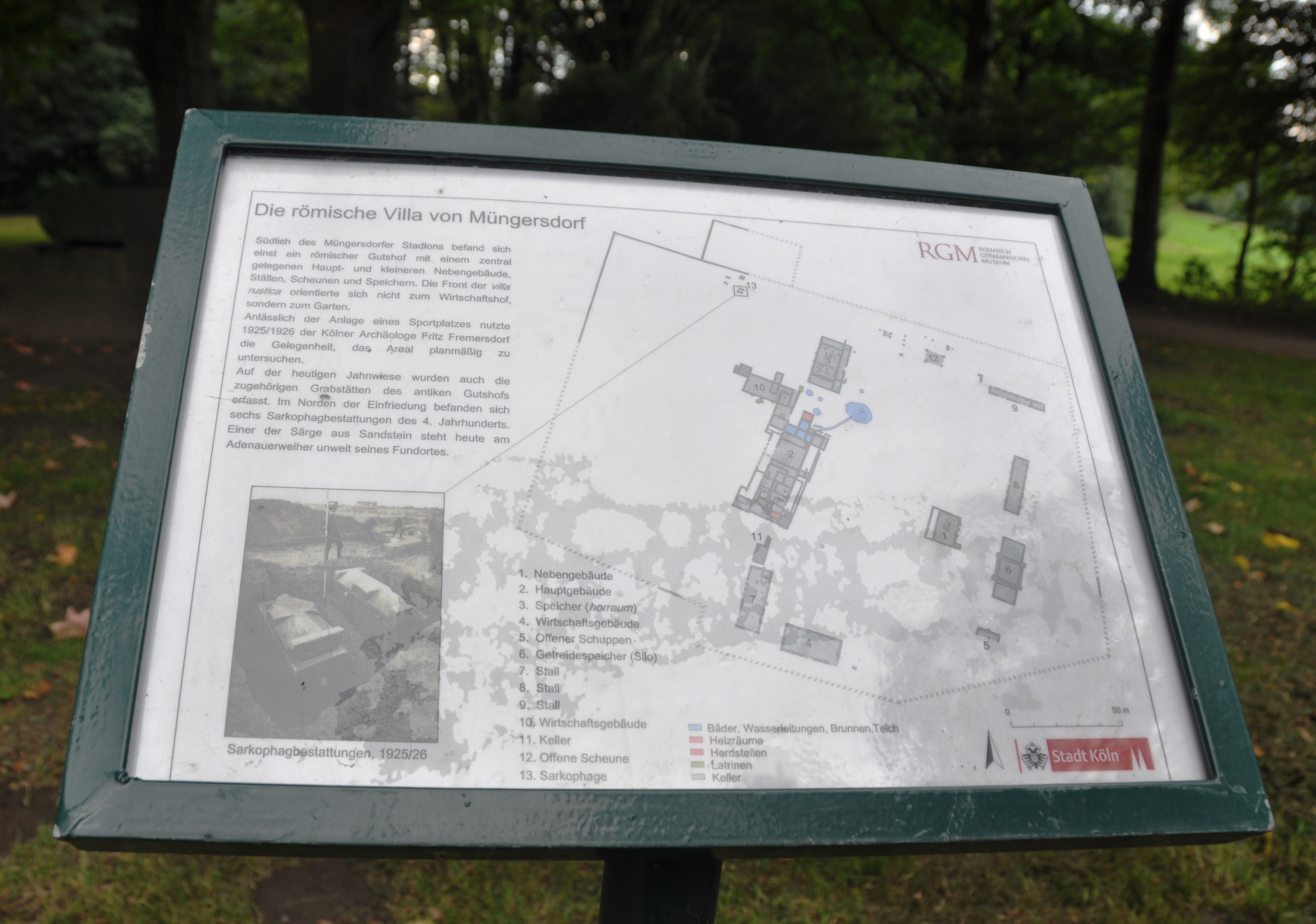 Erläuterungstafel der Ausgrabung "Villa rustica" in Köln-Müngersdorf. Standort neben dem Sarkophag am Adenauer-Weiher